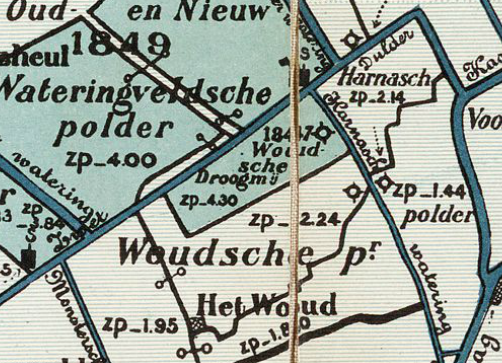 Woudsche_Droogmakerij